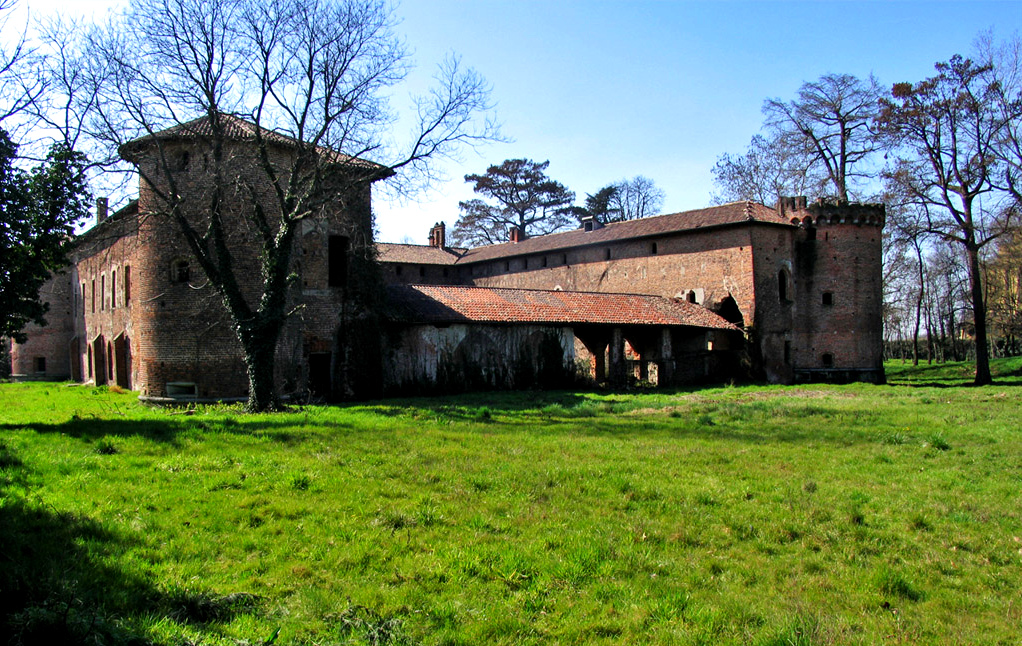 Castello Visconteo - Rozzano 03/2007